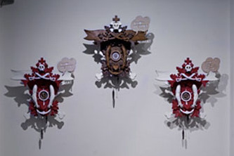 Kuckuksuhren von StefaN sTRUMBEL